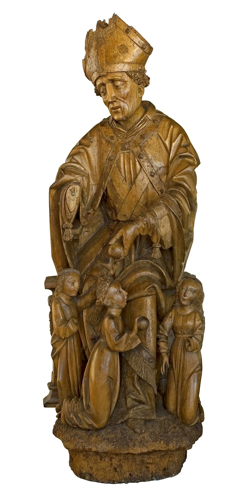 Sv. Mikuláš z kostela sv. Mikuláše v Chebu (kolem r. 1500)